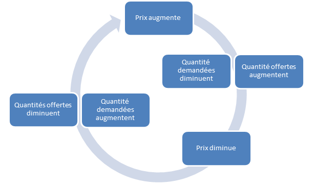 Ce graphique circulaire représente de manière simple le mécanisme appelé par A. Smith "gravitation des prix" et selon lequel le prix, lorsqu'il s'élève trop au-dessus du "prix naturel" (égal, chez Smith, au coût de production), est "tiré" vers le bas, et vice-versa lorsqu'il s'abaisse trop en-deçà de ce prix. Successivement, le prix diminue puis augmente, augmente puis diminue. Il "gravite" autour d'un prix naturel.